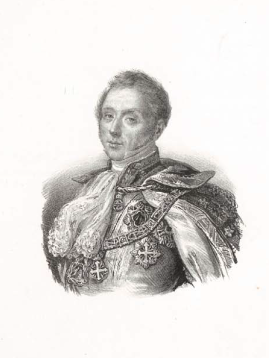 Vittorio Pilo Boyl - Dal Dizionario biografico degli uomini illustri di Sardegna di Pasquale Tola, 1837